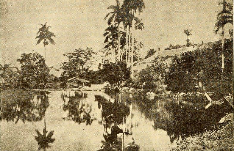 Manantial Bello en Matanza, Cuba